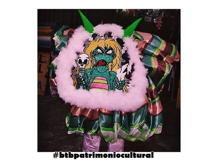 Bate bola Rio de janeiro da turma kuka de realengo ano de 2008